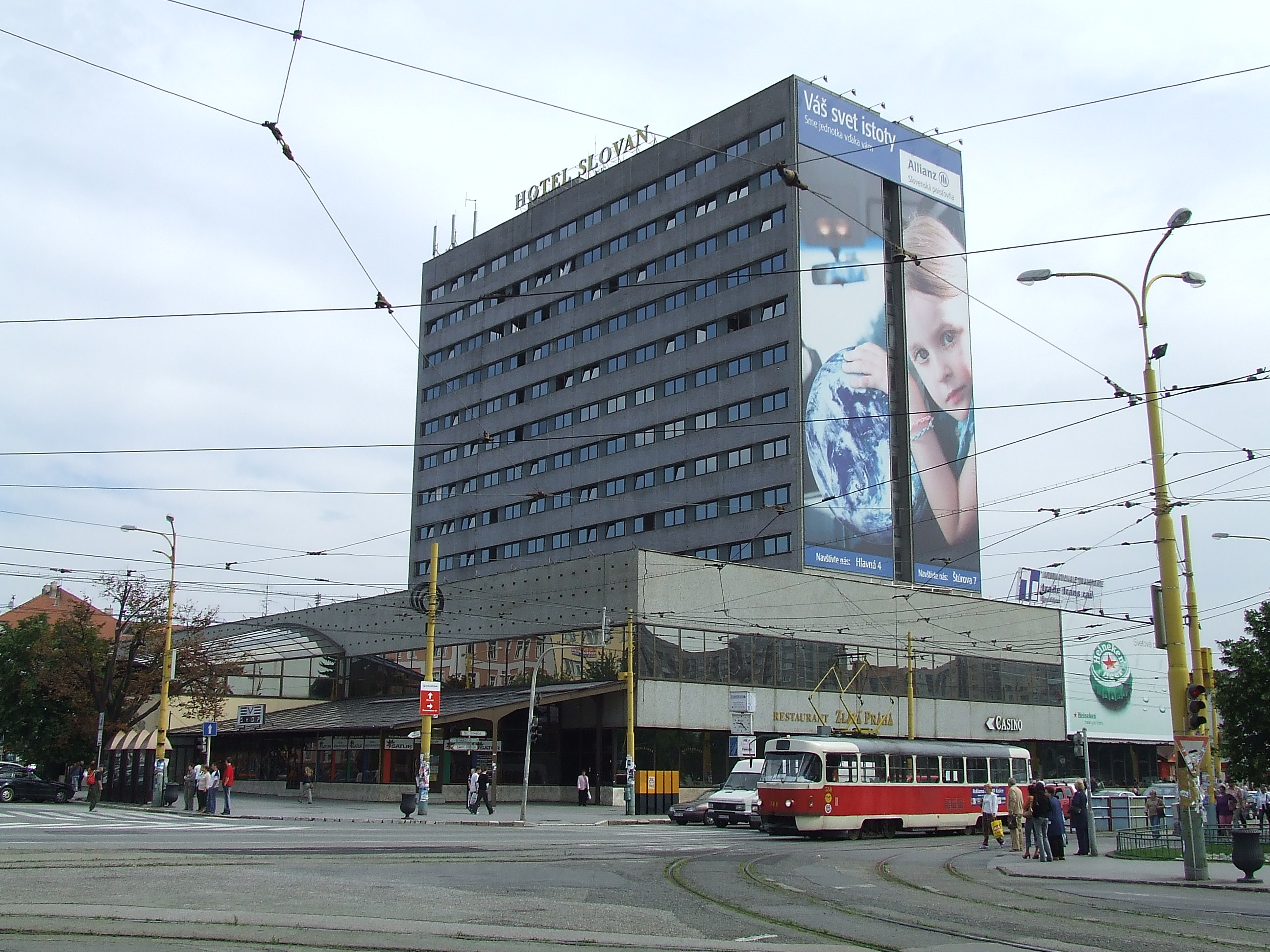 Hotel Slovan v Košiciach postavený na mieste bývalého hotela Schalkház